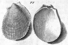 Limaria tuberculata (Olivi, 1792), Limidae, Bivalvia, Mollusca